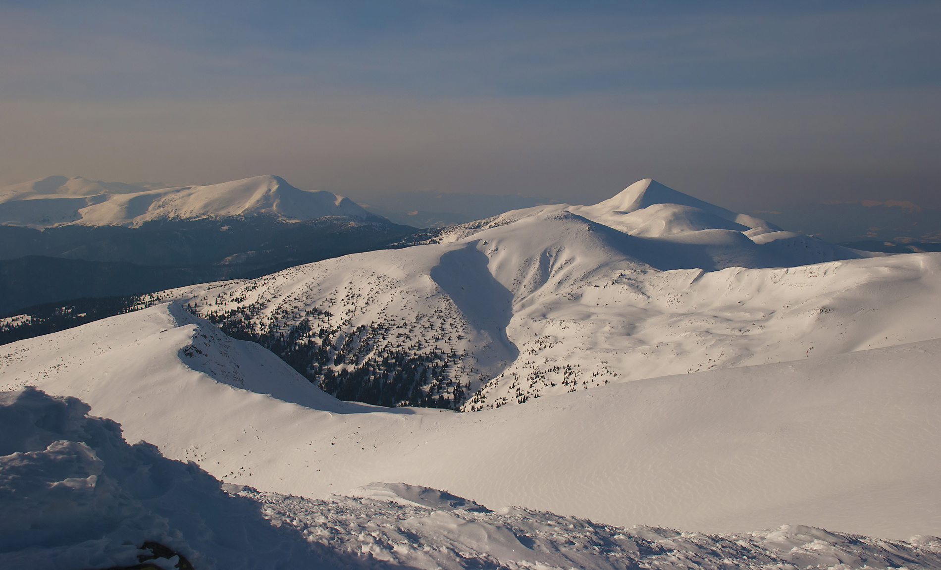 Карпатський біосферний заповідник, Рахівський, Тячівський, Хустський, Виноградівський райони